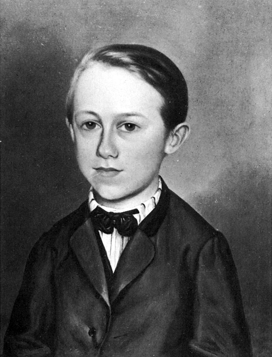 Alois (Louis) Kreuzer, Sohn Vinzenz Kreuzers